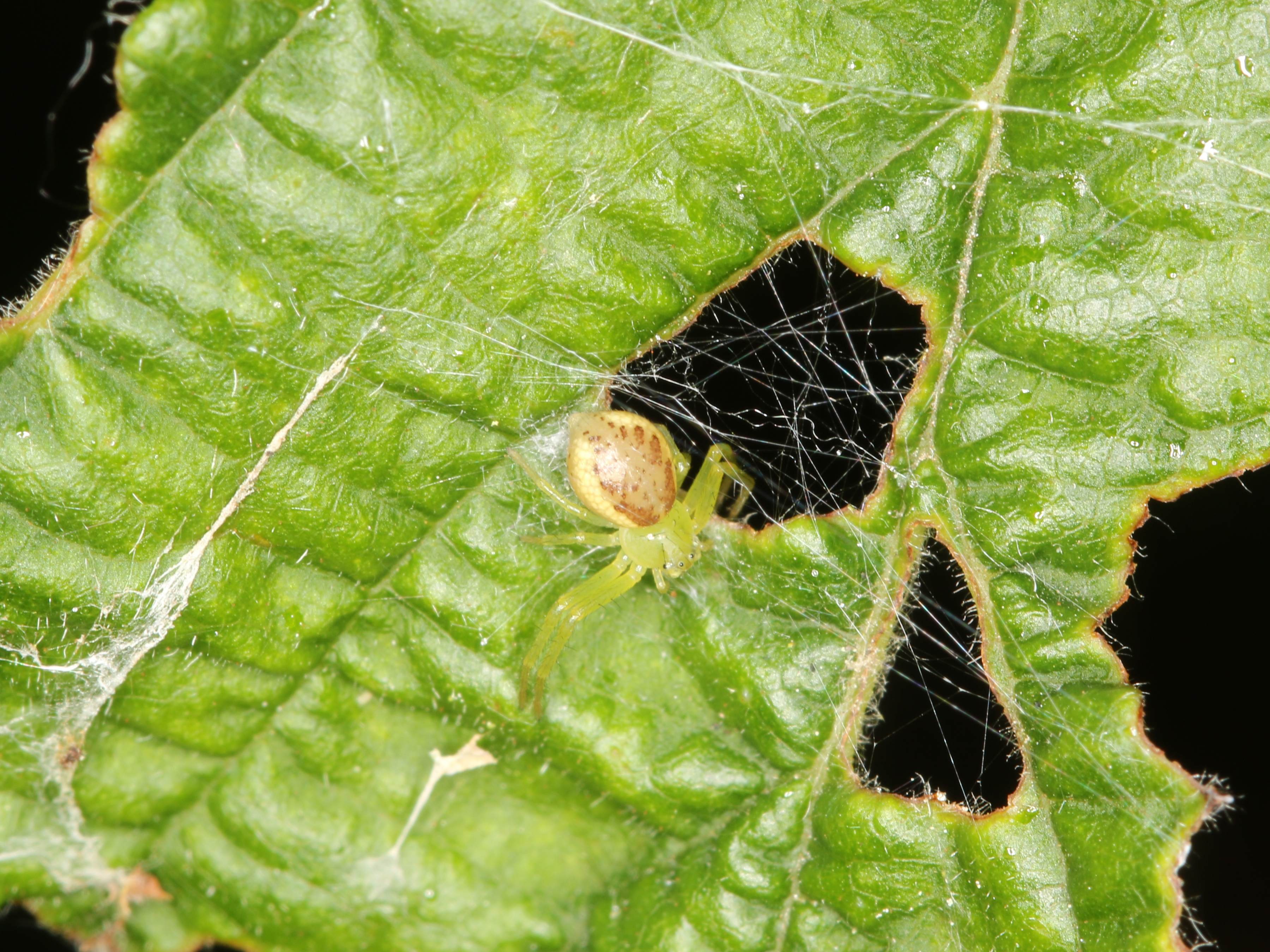 Søborg, Denmark, 4 July 2015